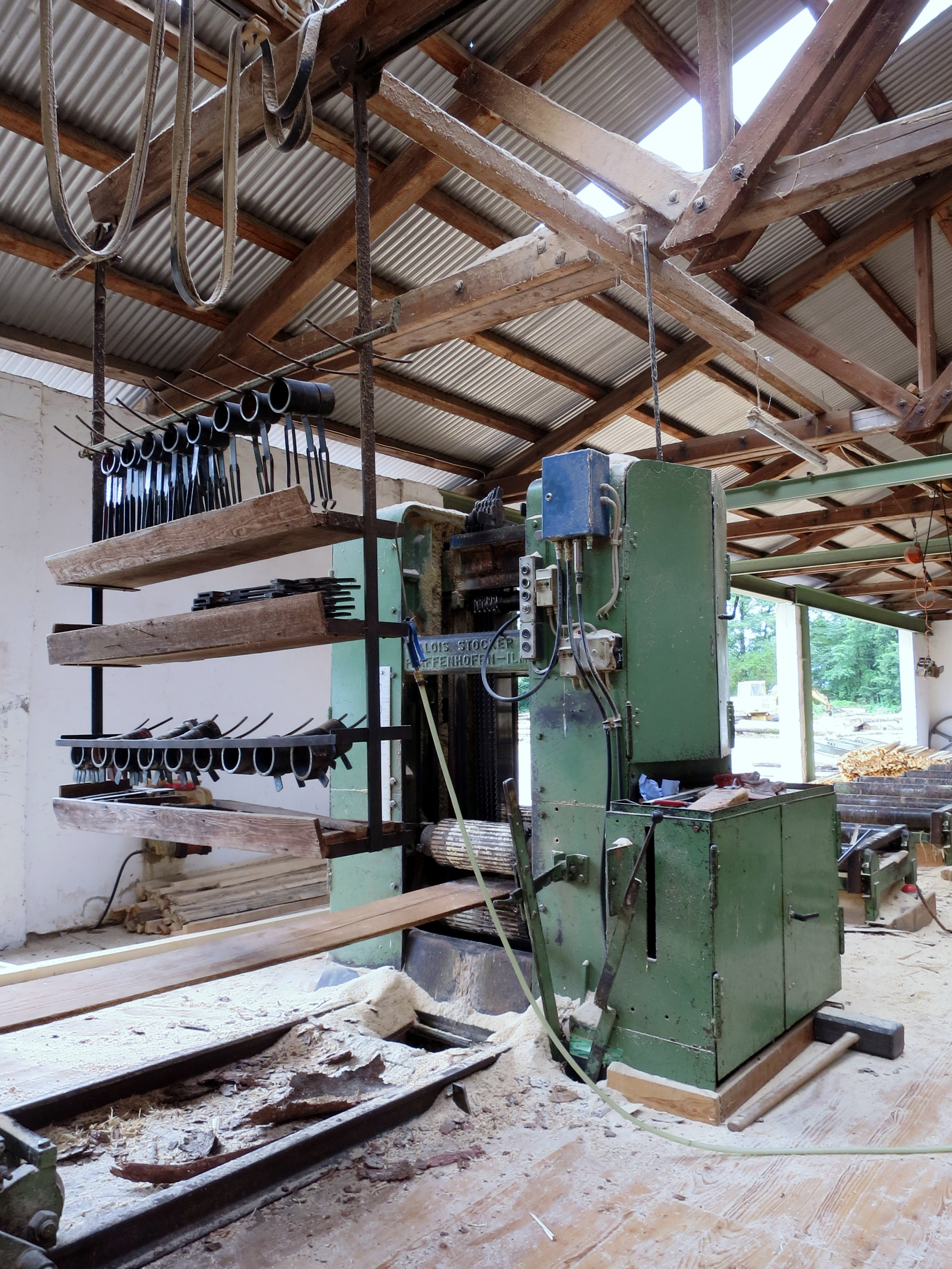 Eine Gattersäge von Stocker aus Pfaffenhofen an der Ilm, Istalliert in der Zirlmühle (im Nordwesten der Altstadt gelegen (ausserhalb der Altstadt (Kernstadt)))